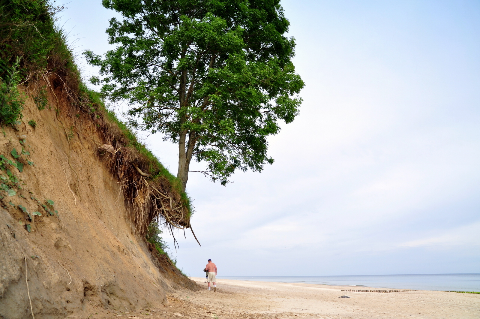 Wybrzeże Słowińskie - przykład erozji morskiej